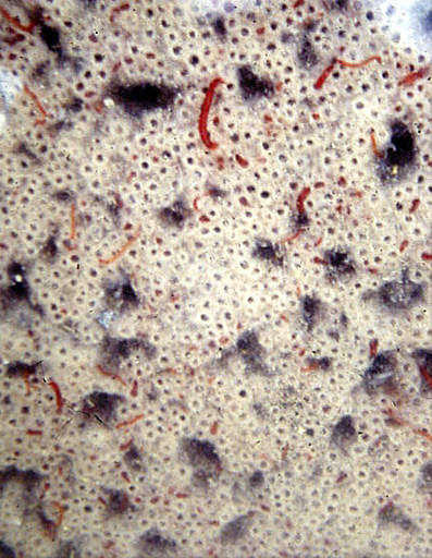 A Blendecques (France), dans le fleuve Aa, dans les années 1985-1990, les sédiments constitués ici principalement des rejets chroniques d'une papeterie à la station d'épuration de capacité insuffisante et dysfonctionnant, offrent un habitat au chironome plumeux, dont des milliards de larves creusent des galeries où ils se nourrissent. Cette larve est l'un des rares organismes invertébrés (avec une sangsue et des tubifex) à survivre dans les sédiments très chargés en matière organique en décomposition). En aérant la vase elles contribuent au processus d’auto-épuration et à la transparence de l'eau.